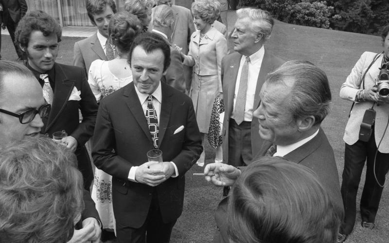 Bundeskanzler Willy Brandt empfängt Filmschauspieler Information added by Wikimedia users.Ergänzung: Neben Eddie Arent stehen Hans-Jürgen Bäumler (links) und Viktor de Kowa (rechts nach hinten versetzt). Außerdem auf dem Foto: Heintje (hinter Bäumler) und Marika Kilius (hinten)